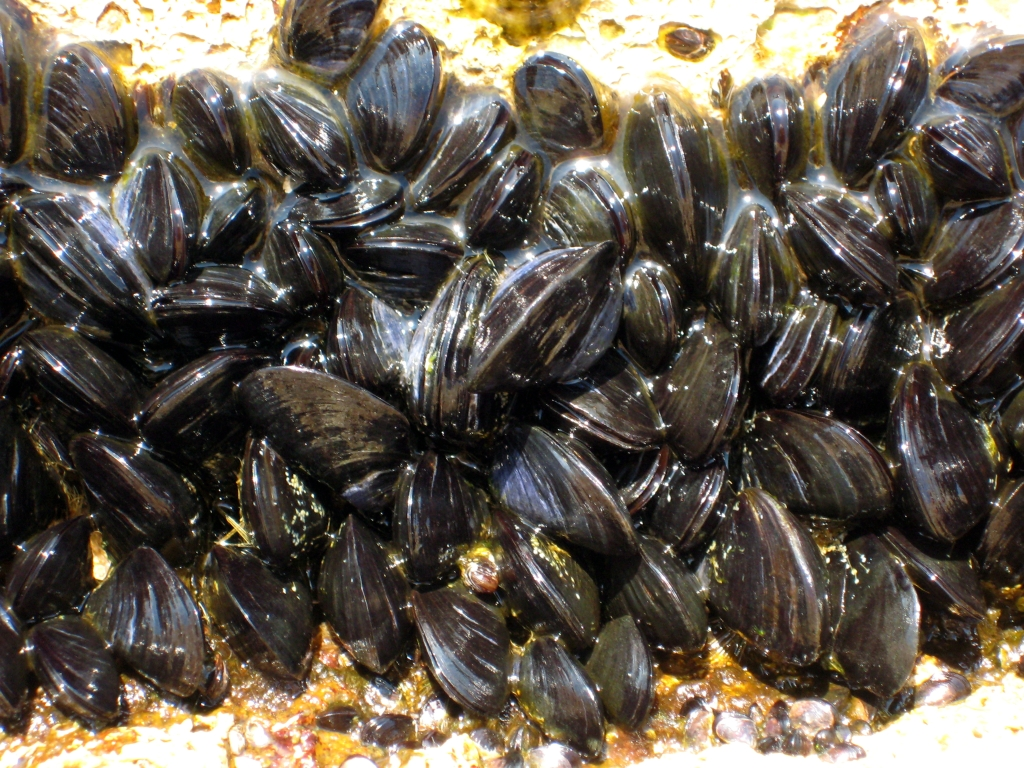 mlade dagnje u Selcu, Hrvatska